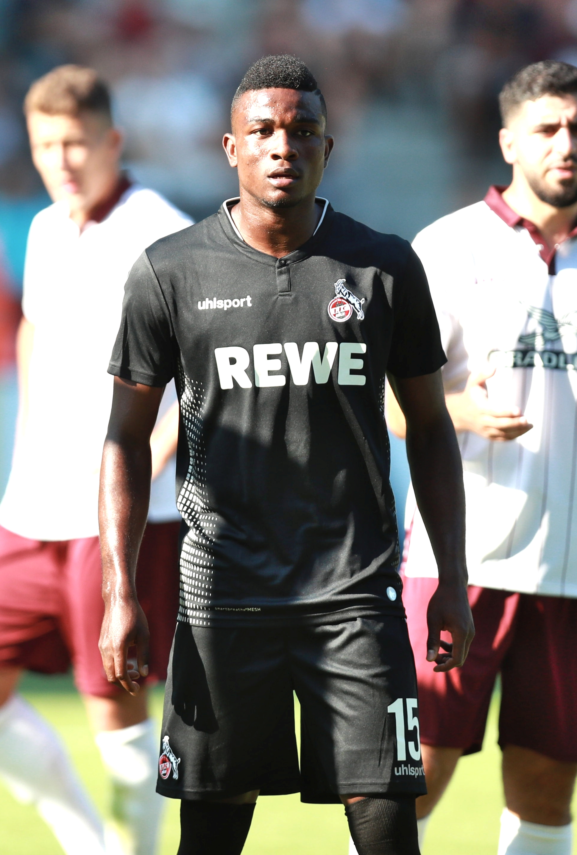 DFB-Pokal 2018/19, 1. Hauptrunde: BFC Dynamo gegen 1. FC Köln 1:9 (1:4)